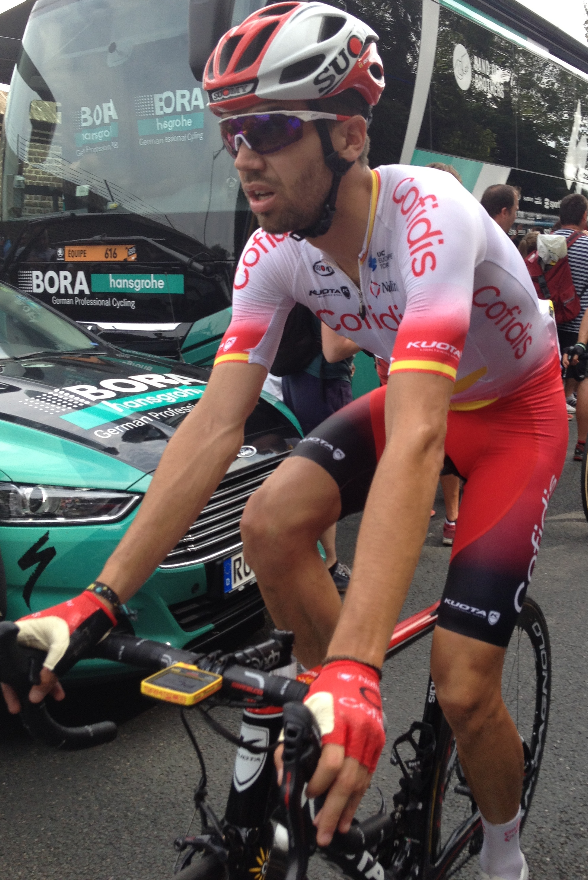 Grand Départ van de Tour de France in Brussel, finish in Laken op zaterdag 6 juli 2019